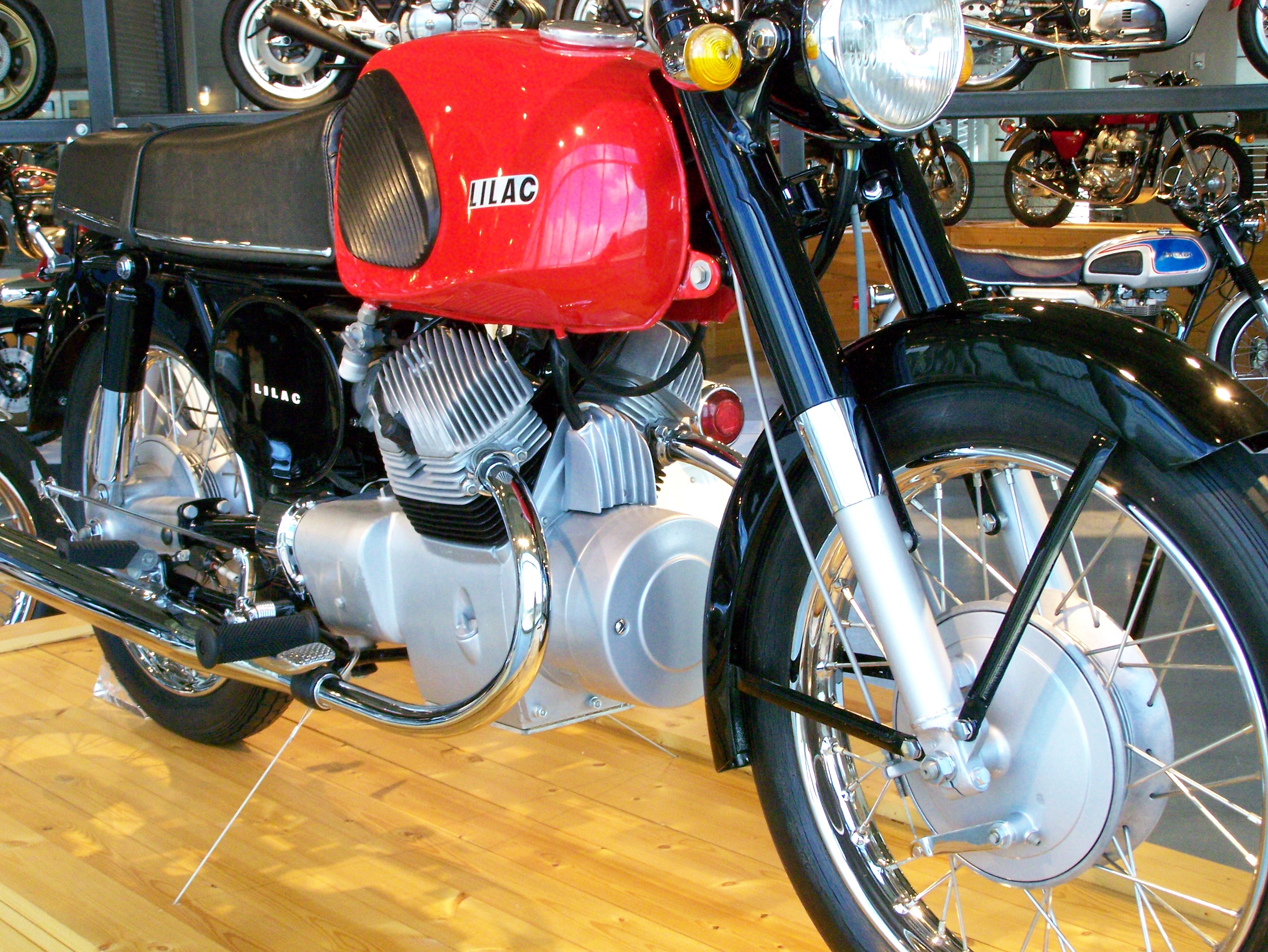 Barber Vintage Museum_430 Marusho Lilac